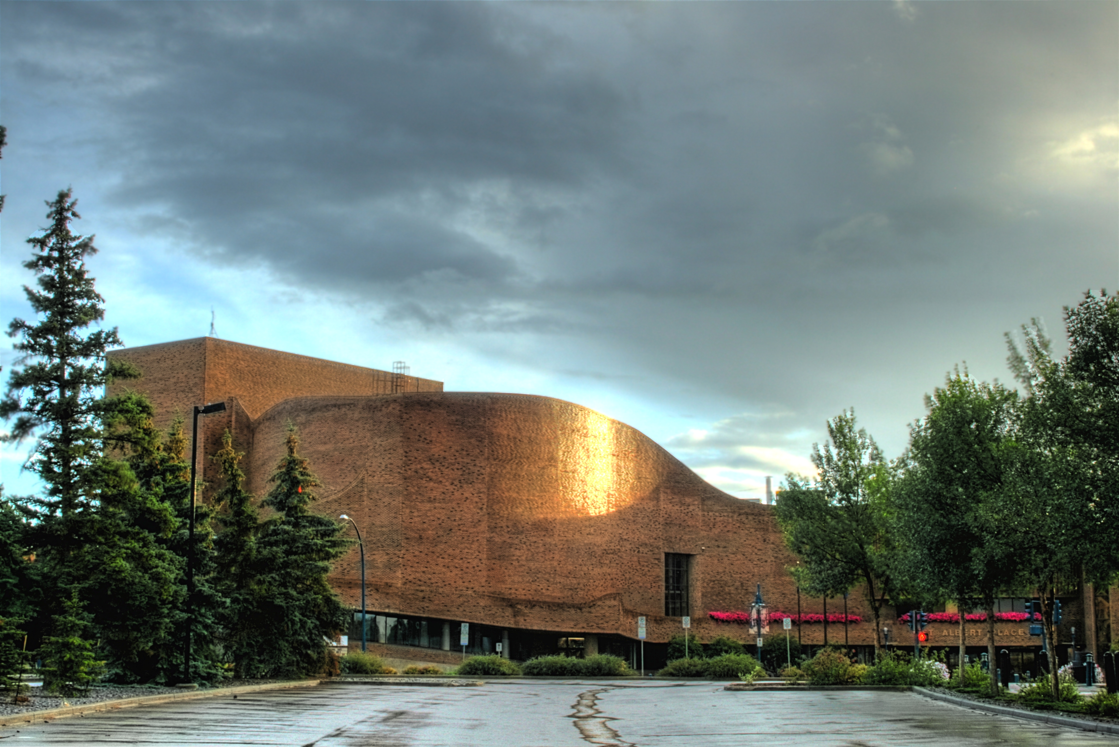 St. Albert Place in St. Albert, Alberta, Canada.